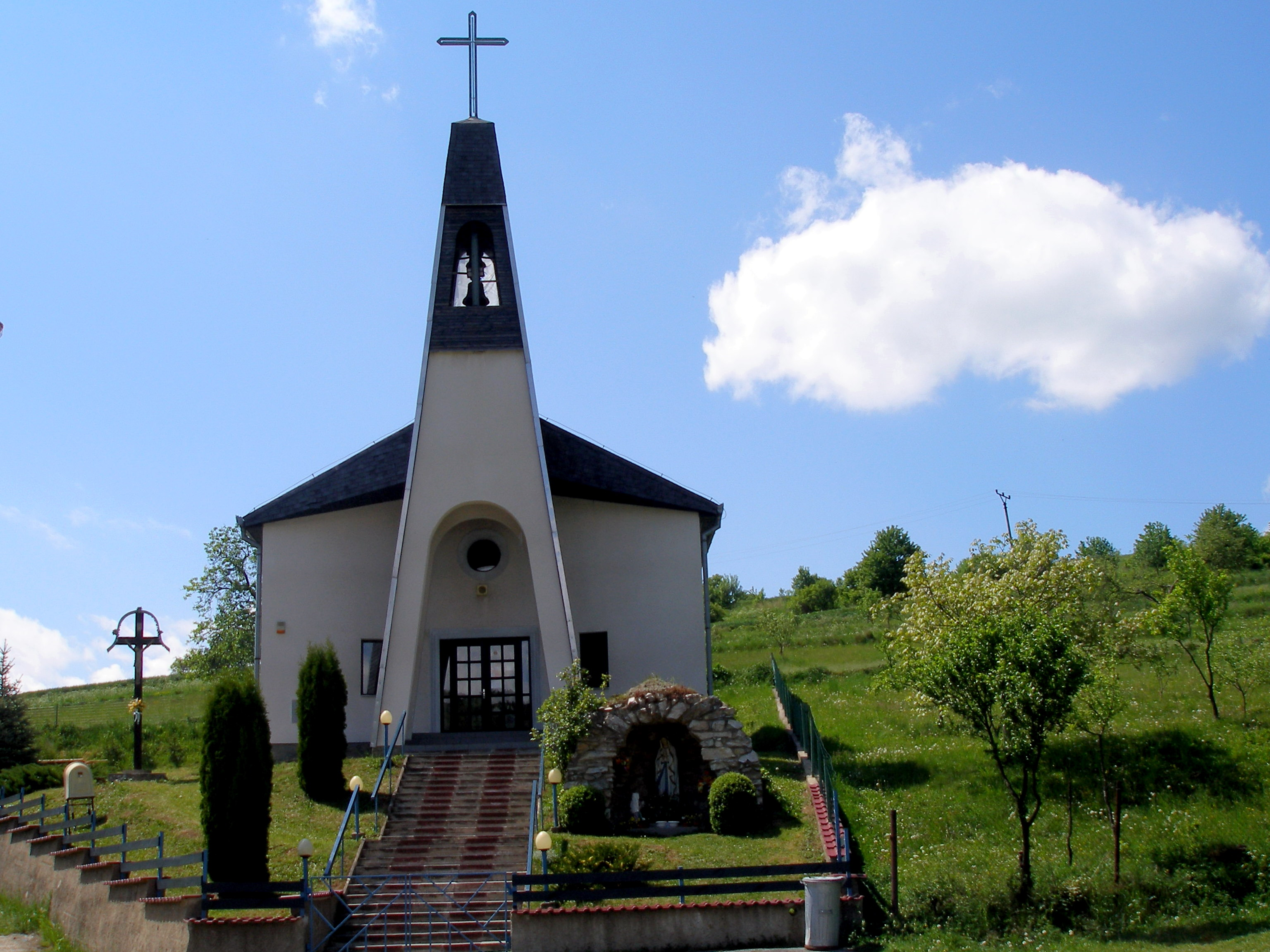 Obec Milpoš okres Sabinov.